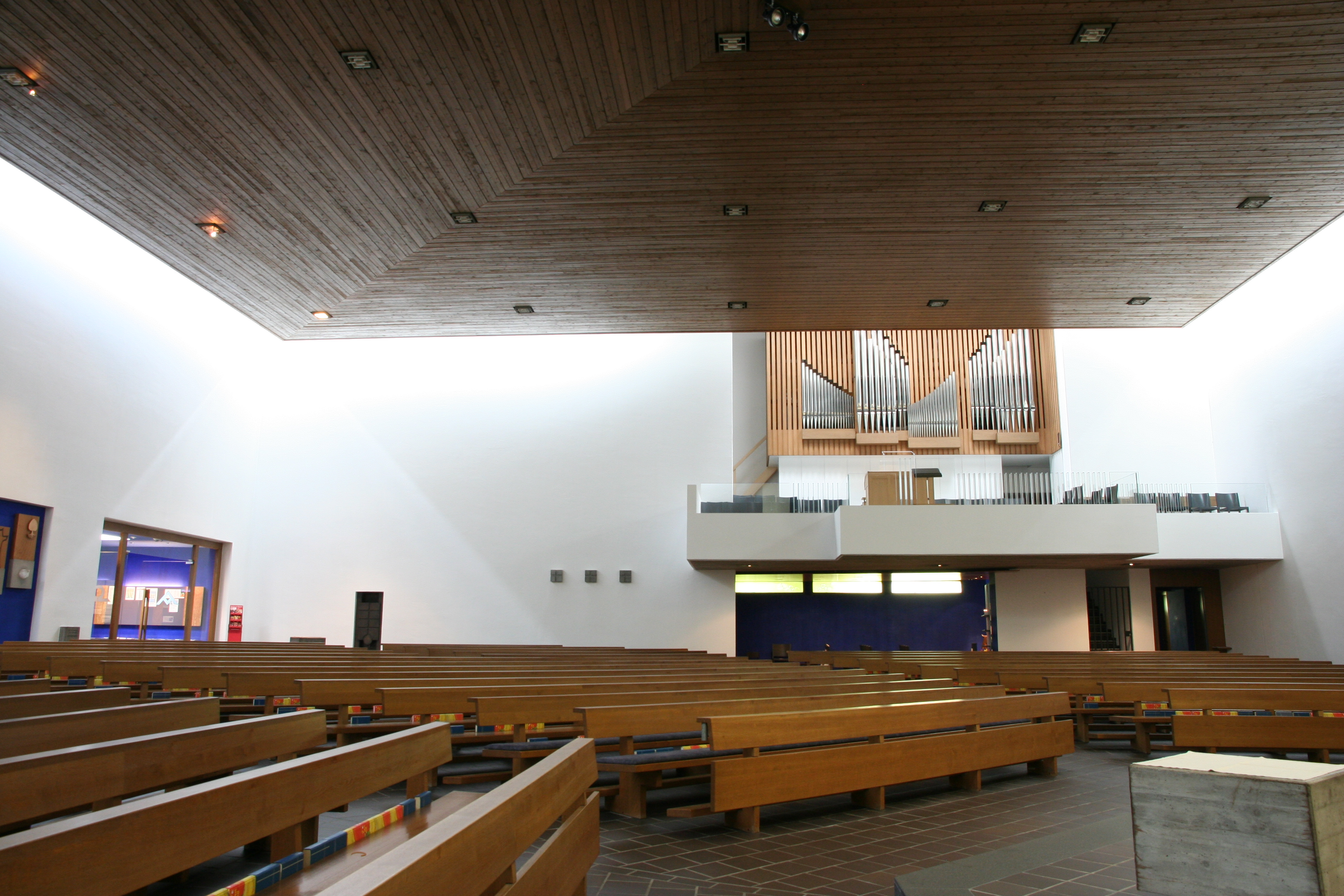 Römisch-katholische Pfarrkirche Dreifaltigkeit Rüti ZH, Blick zur Orgel